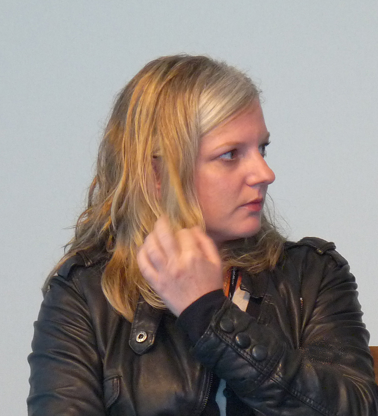 Delphine Bertholon au Salon du livre en Bretagne (Vannes, Morbihan)